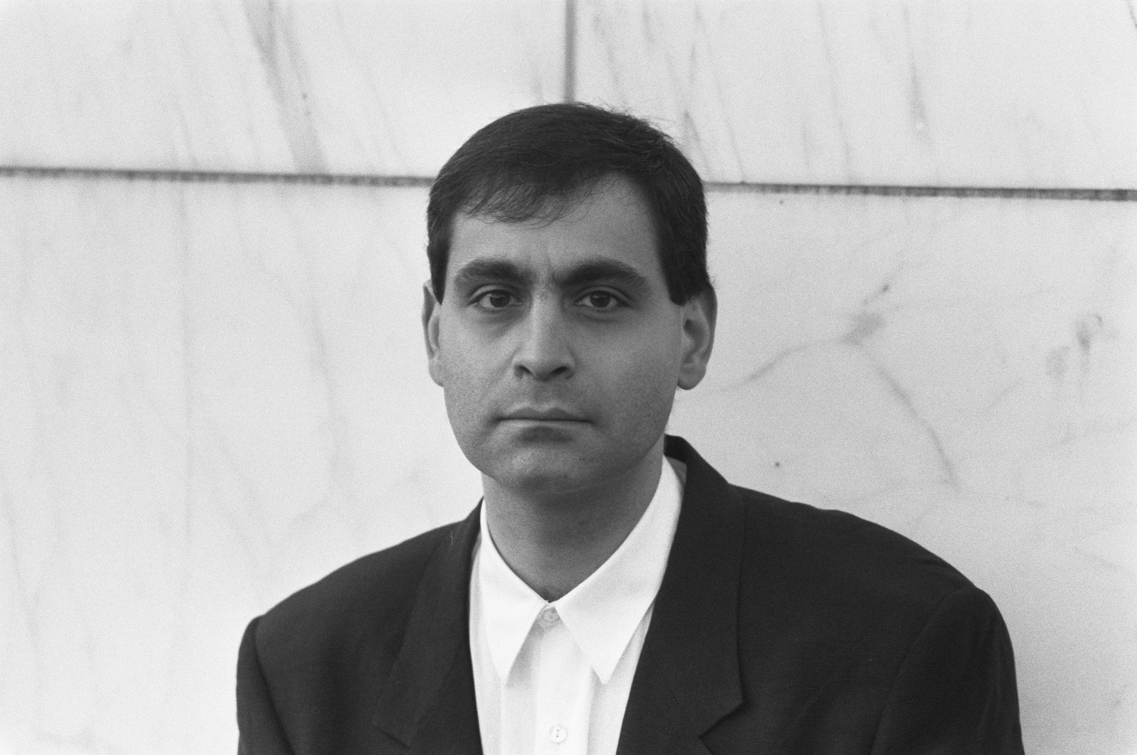 Collectie / Archief : Fotocollectie Anefo Reportage / Serie : [ onbekend ] Beschrijving : Pierre Audi , nieuwe artistiek leider van Nederlandse Opera Stichting , koppen Datum : 4 november 1988 Persoonsnaam : Pierre Audi Fotograaf : Bogaerts, Rob / Anefo Auteursrechthebbende : Nationaal Archief Materiaalsoort : Negatief (zwart/wit) Nummer archiefinventaris : bekijk toegang 2.24.01.05 Bestanddeelnummer : 934-3519